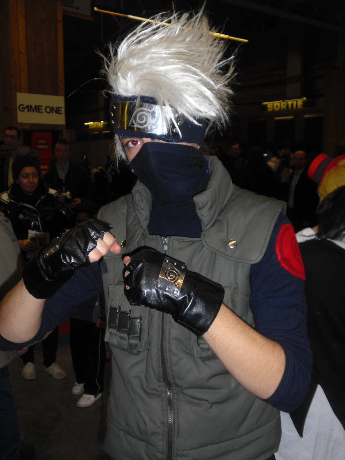 Photo prise au salon Paris manga